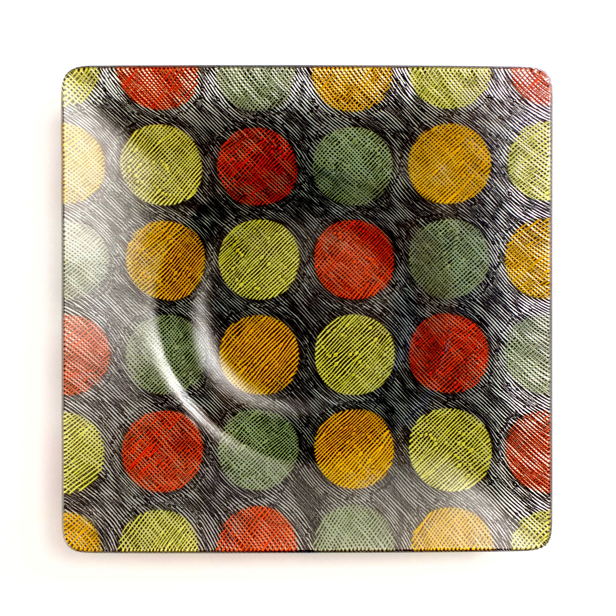 Schale, Verschmelztechnik, Jahr 2017, Beschreibung: mit Email eingefärbtes Klarglas, Intarsienarbeit, Rand poliert, Größe: 44 x 44 x 7cm